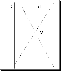 Droites parallèles en géometrie euclidienne